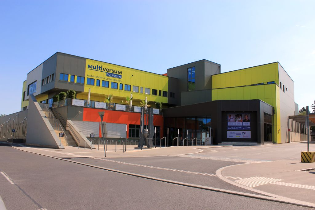 Die Veranstaltungshalle Multiversum in Schwechat